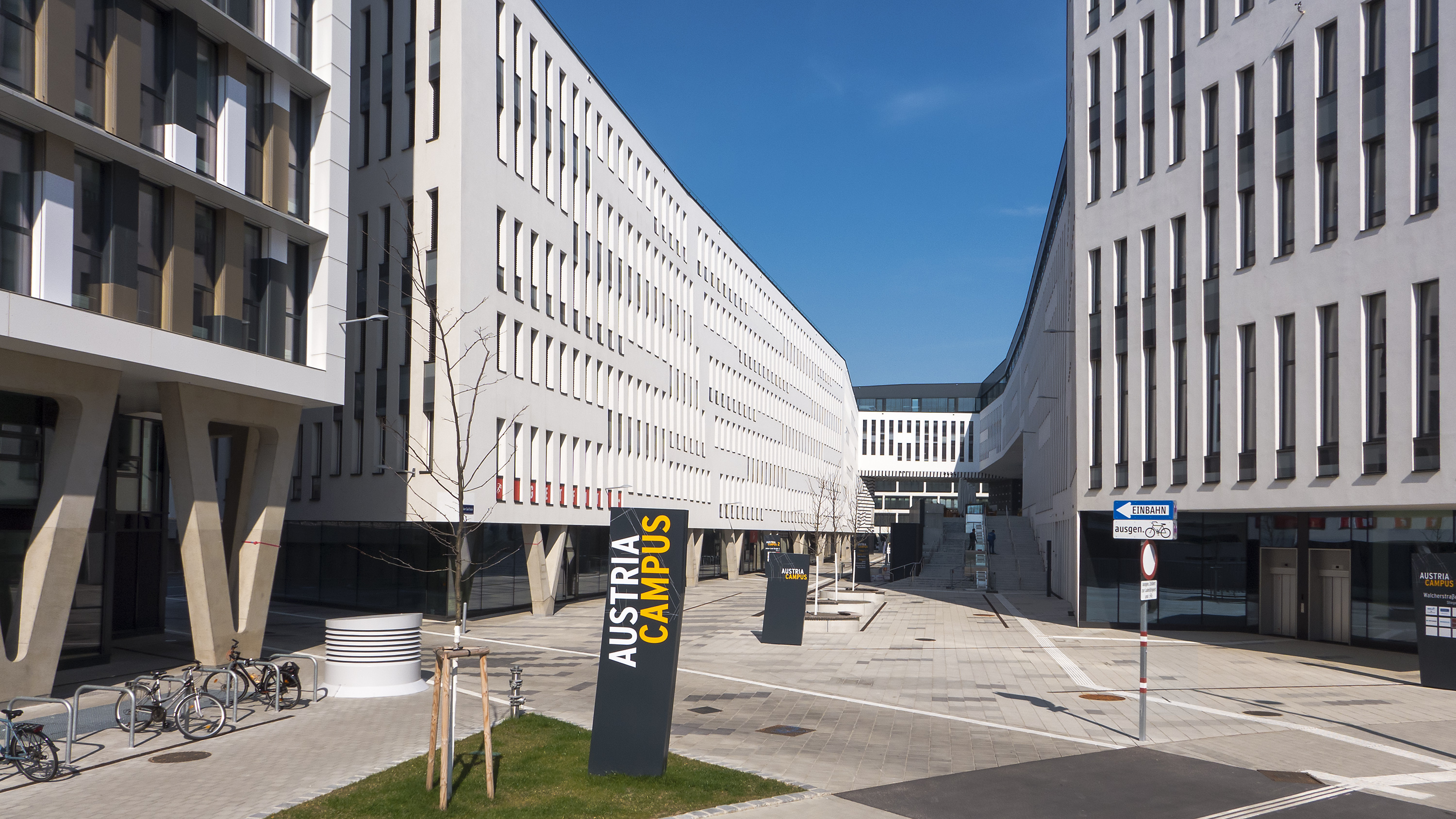 Austria Campus in Wien 2